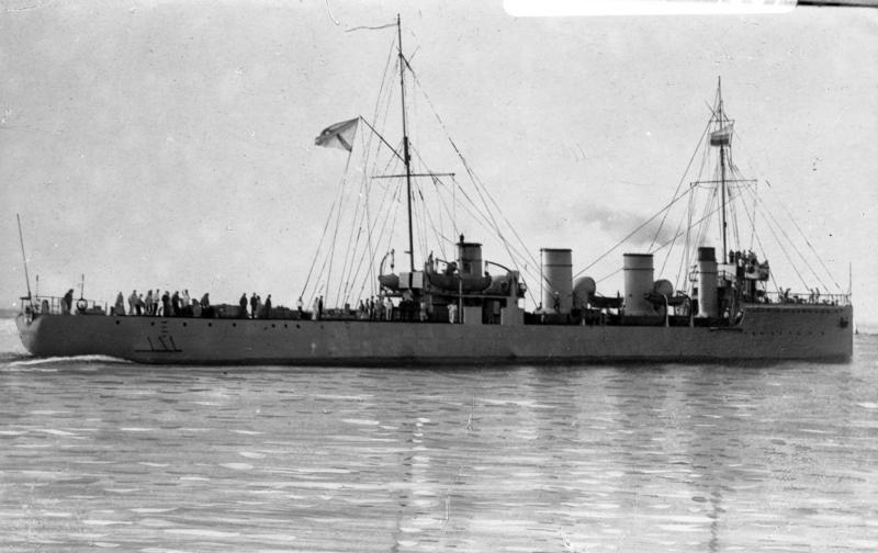 Torpedobootszerstörer Nowik Nowik Russ. Torpedobootszerstörer; Stapell: 1911; In See [Russischer Torpedobootszerstörer Nowik]